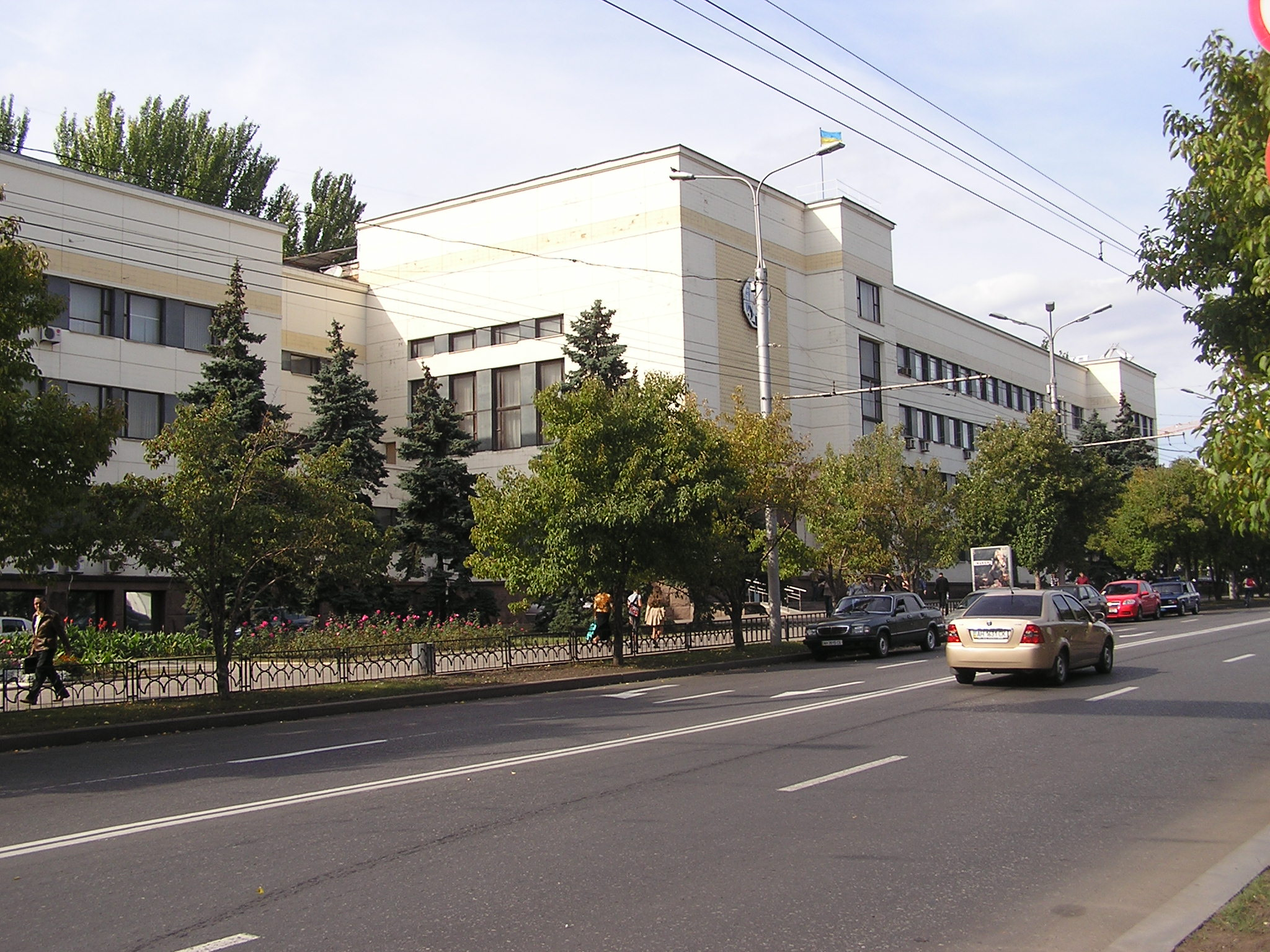 Площадь Ленина в Донецке